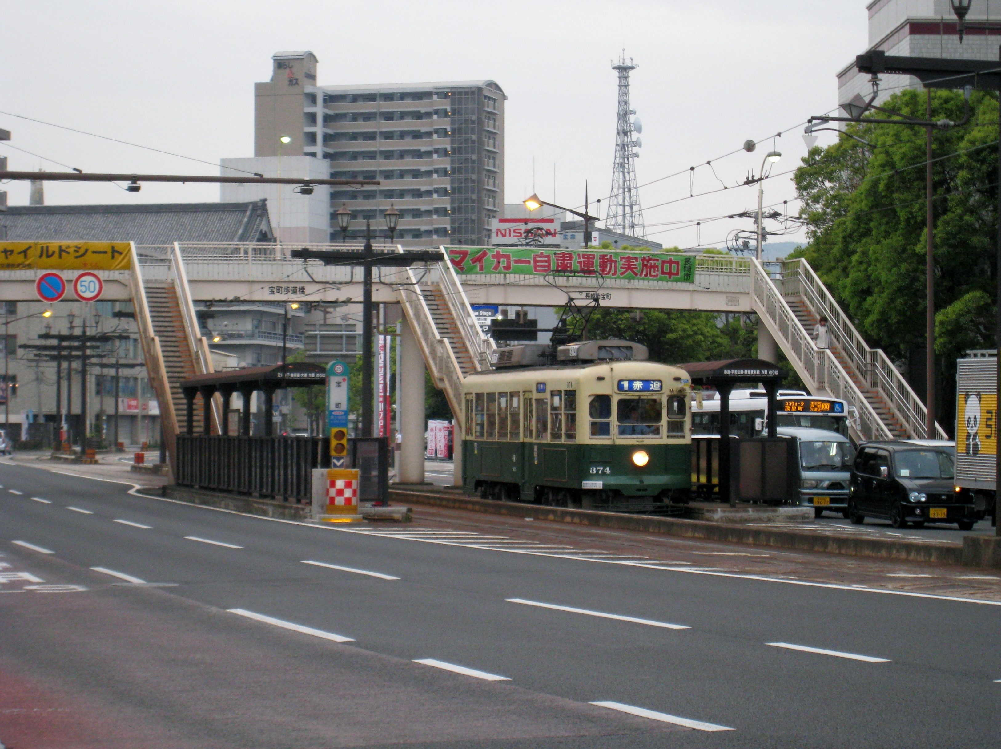 長崎市宝町電停